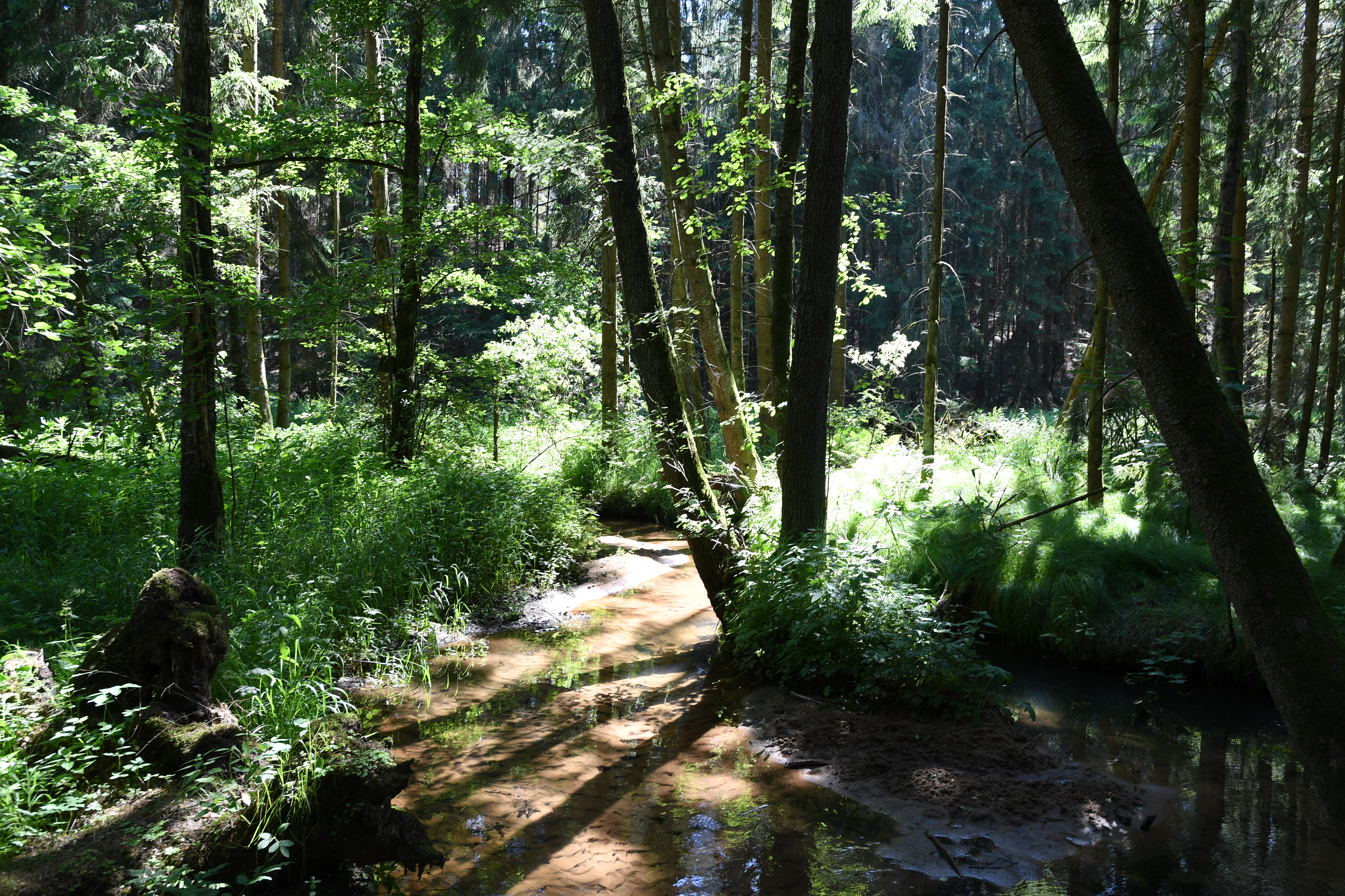 Röthenbach (Pegnitz) bachabwärts der Weiherkette von Ungelstetten